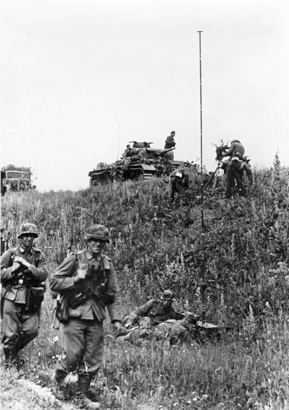 Russland, Bereitstellungsraum wird bezogen Scherl Bilderdienst: Überall wo entscheidende Kämpfe im Gange sind, wird die Infantrie-Division "Grossdeutschland", jener Verband unseres Heeres, der sich aus Freiwilligen aus dem ganzen Reich rekrutiert, eingesetzt. Panzer und Schützen beziehen ihren Bereitstellungsraum aus dem heraus sie zum Angriff vorbrechen. PK-Kriegsberichterstatter Kempe 16.07.42 [Herausgabedatum] 4134-42 [Sowjetunion.- Infanterie-Division Grossdeutschland beziehen den Bereitstellungsraumes, im Hintergrund zwei Soldaten an einem Funkgerät, auf dem Hügel ein Panzer III]